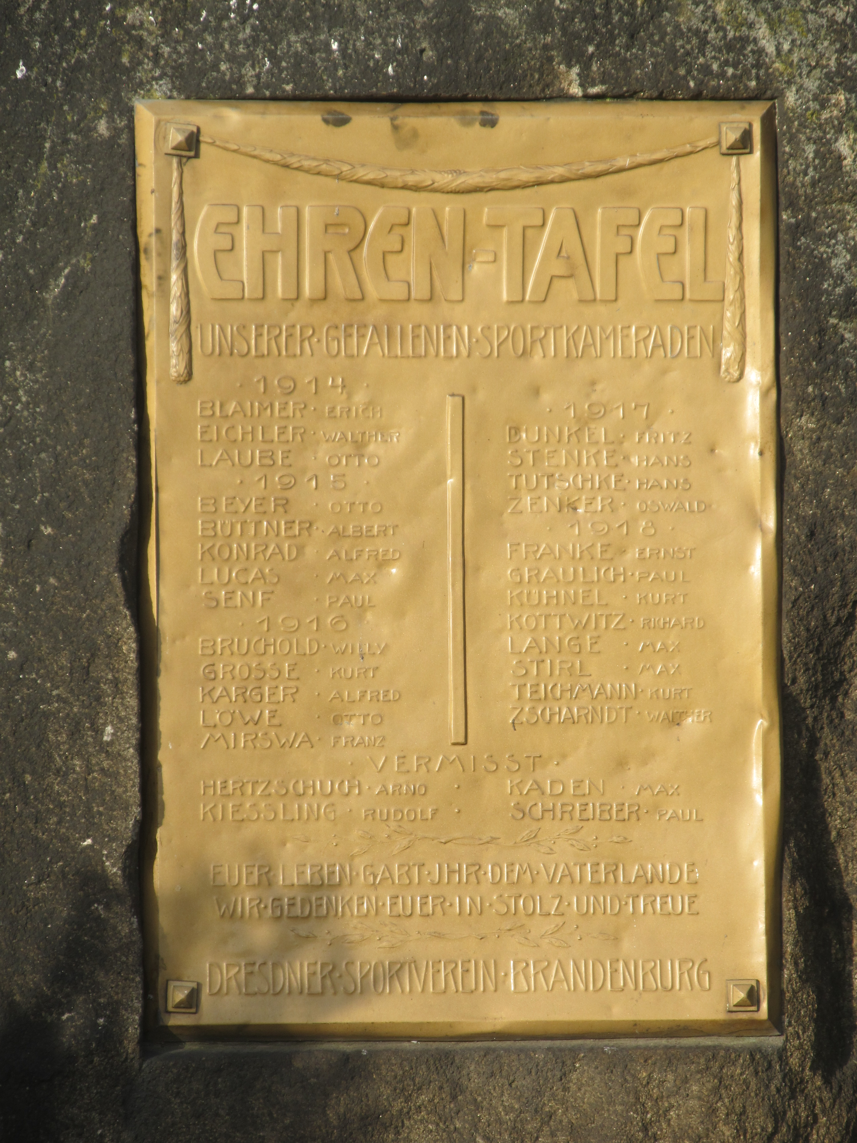 Ehrentafel im Gedanken an die im 1. Weltkrieg gefallenen Sportkameraden des SV Brandenburg 01 Dresden am Dreyßigplatz in Dresden-Mickten, wo sich einst der Sportplatz dieses Vereins befand, der 1933 in den Sportfreunden 01 Dresden aufging